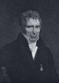 Jacob Lieven van Caneghem - Bellem - Aalter - Oost-Vlaanderen - Vlaanderen - België. Textielbaron en mecenas. Voorvader van prinses Mathilde van België